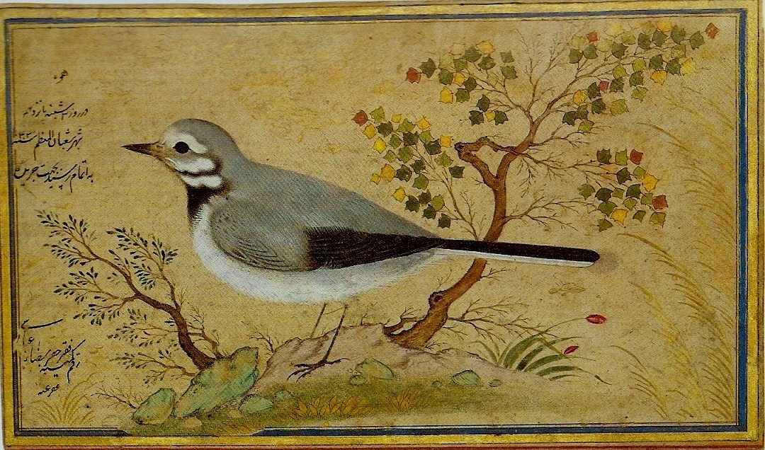 Риза йи-Аббаси. Птичка. 1634.